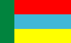 Прапор смт Пролетарський